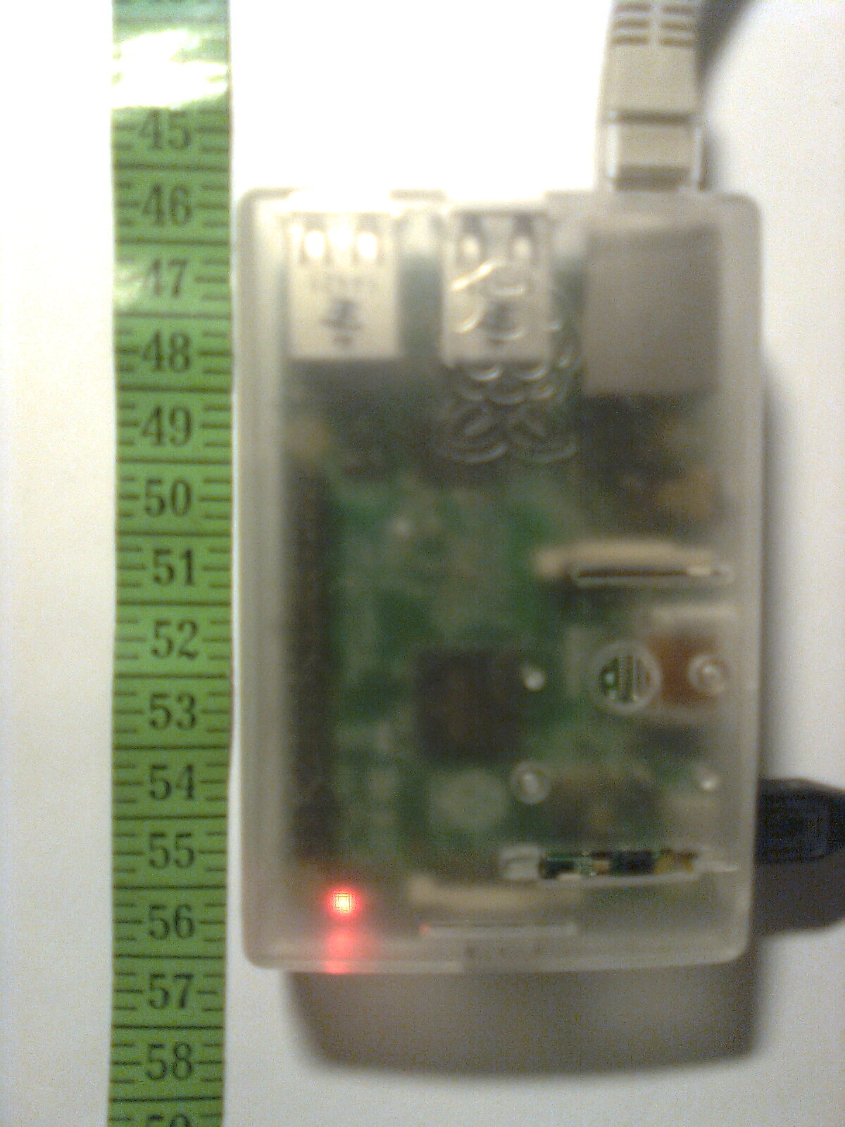 Raspberry Pi 2 B modell működés közben